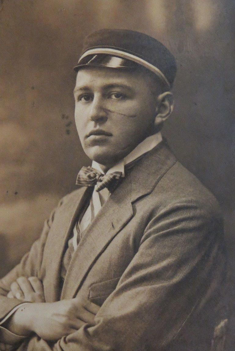 Visitenkarte (CDV) - Berlin - Corps Marchia & Corps Rhenania Tübingen - 1919 - Berthold Ostertag Photograph: R. Kasbaum Berlin Rückseitig mit Widmung von B. Ostertag Z! Z! ... SS 19 [KCL 1930, 129,628 + KCL 1930, 5, 584: Berth. Ostertag] Berthold Ostertag war ein bekannter Professor und Pathologe